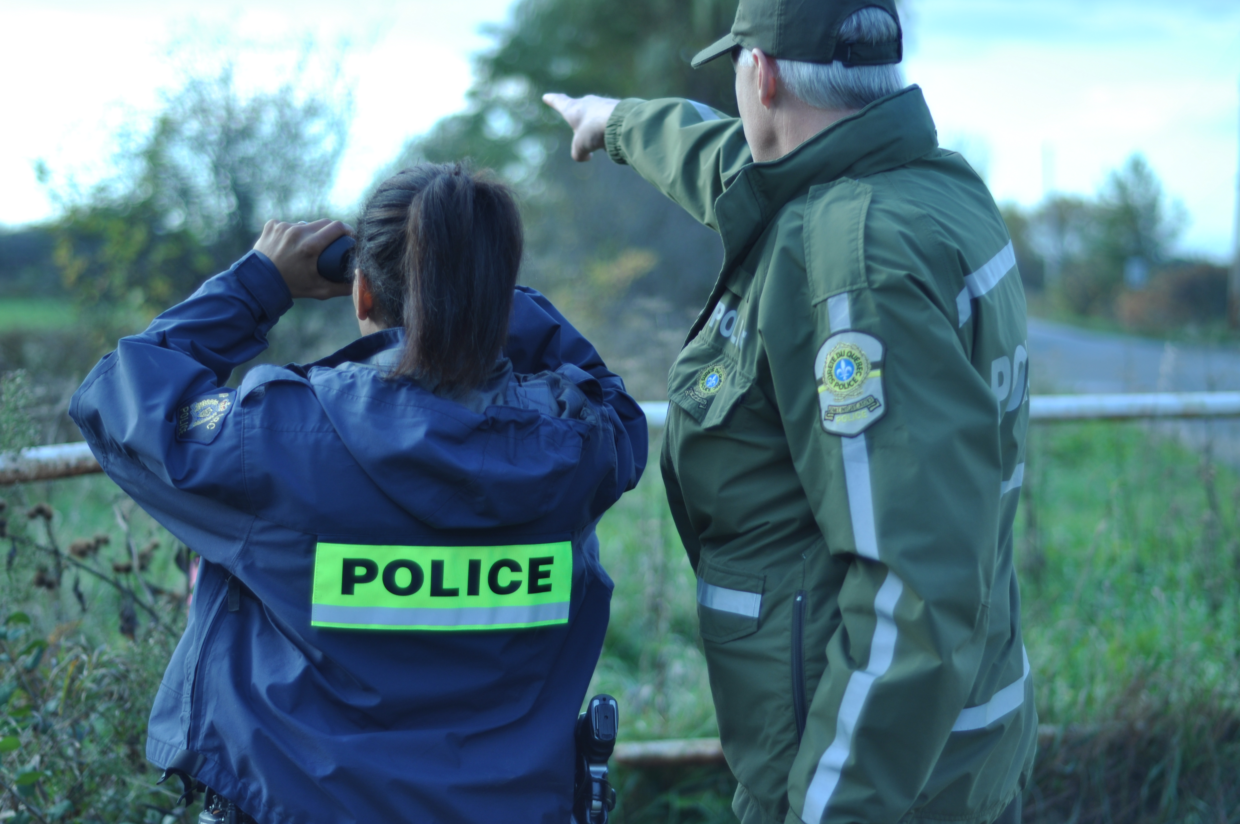 surveillance